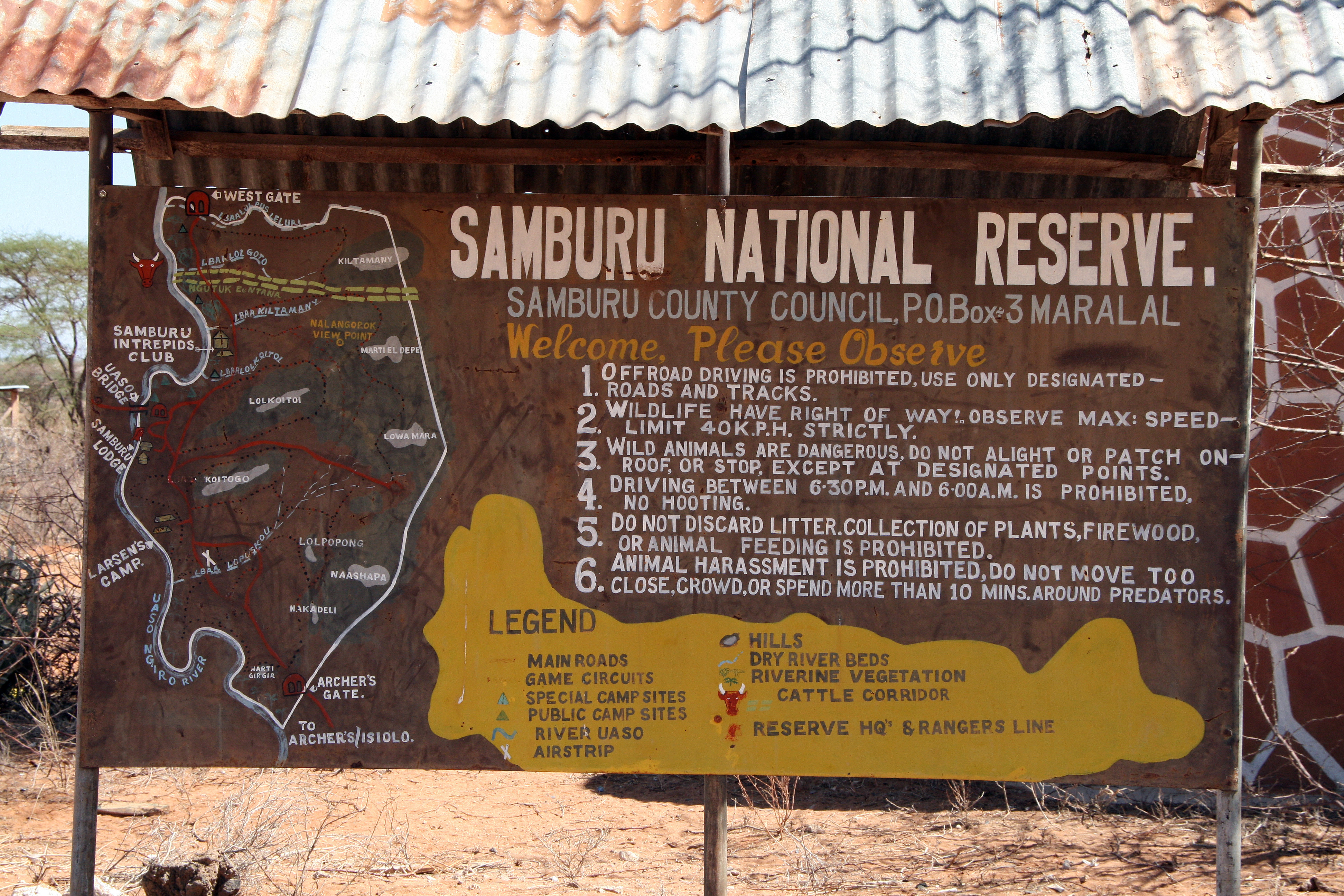 R`gles de la Réserve nationale de Samburu